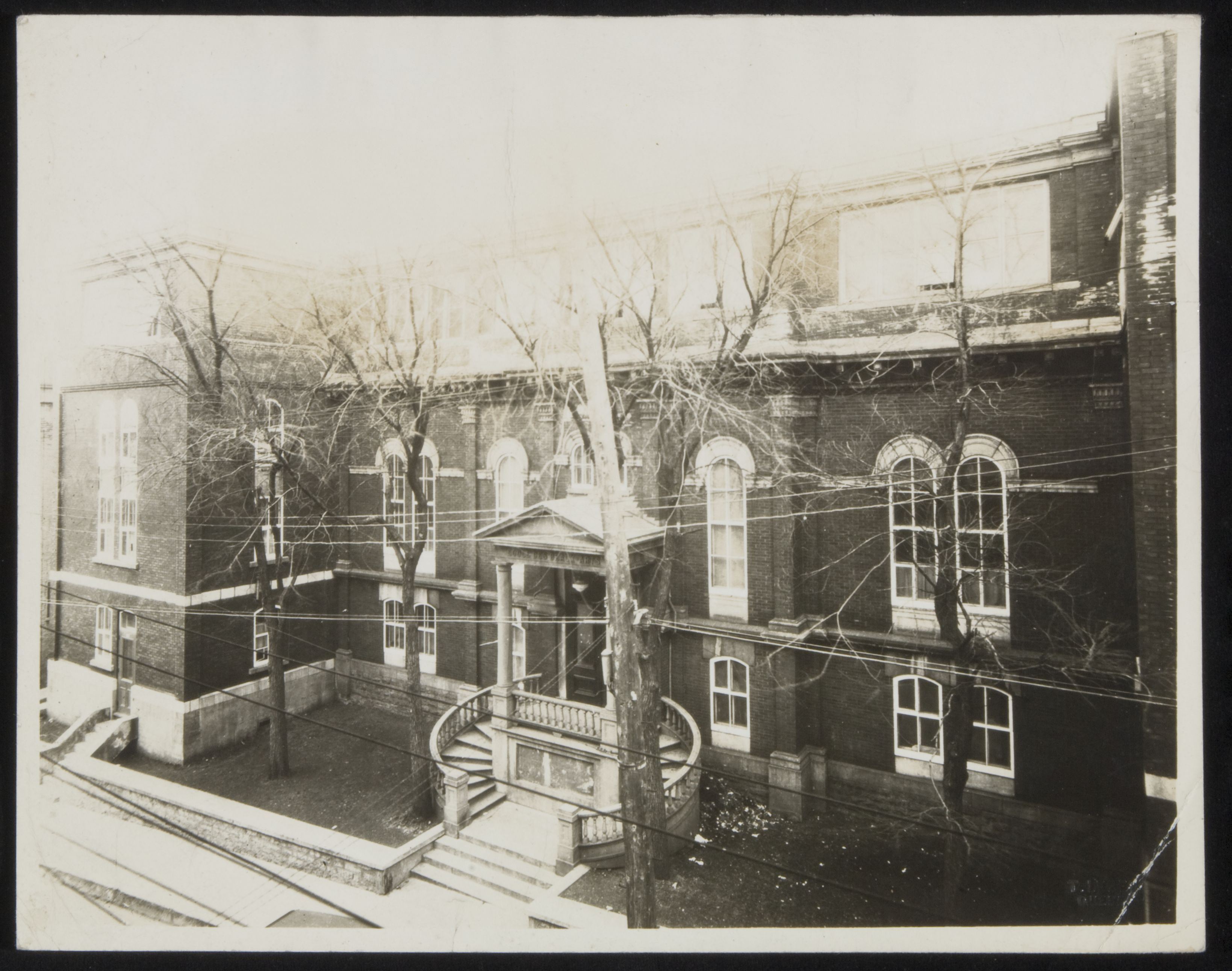 École des beaux-arts de Québec par Thaddée Lebel, Collection Musée national des beaux-arts du Québec 2006.3047. Photographie publiée dans le Rapport du secrétaire et régistraire de la province de Québec pour l'exercice 1933-1934.